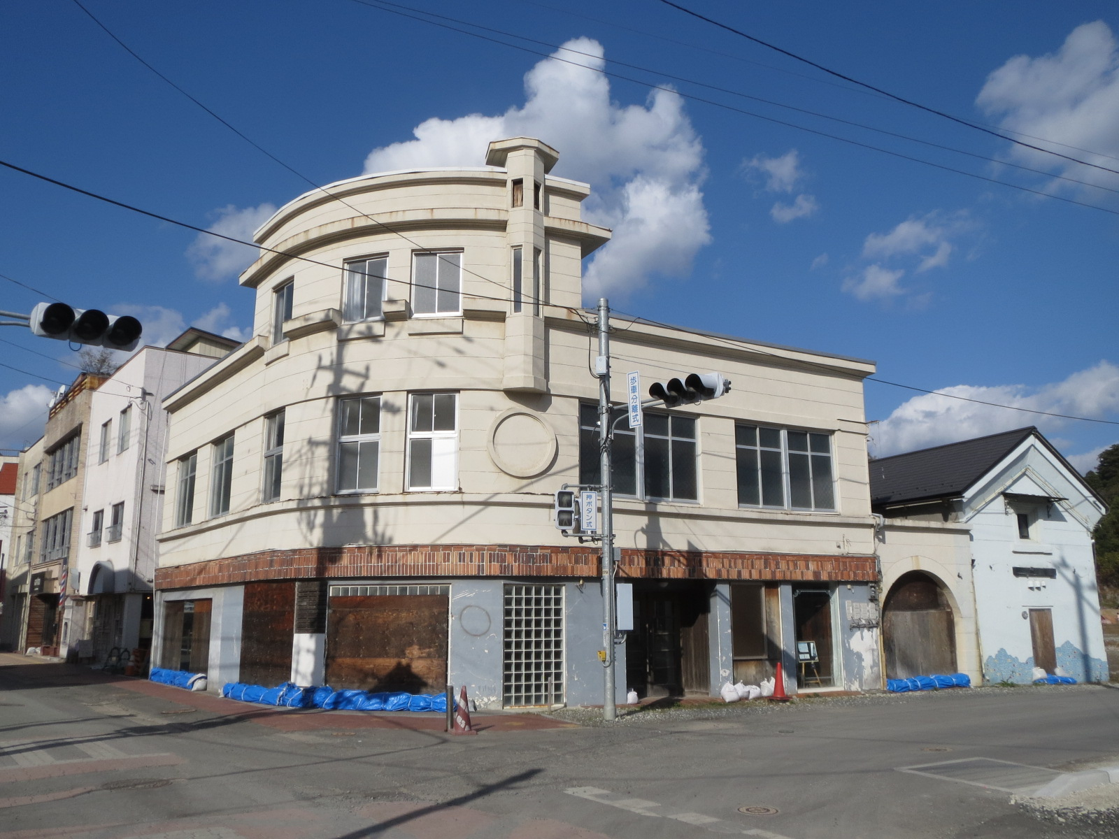 気仙沼市にある千田家住宅 Canon IXY 3